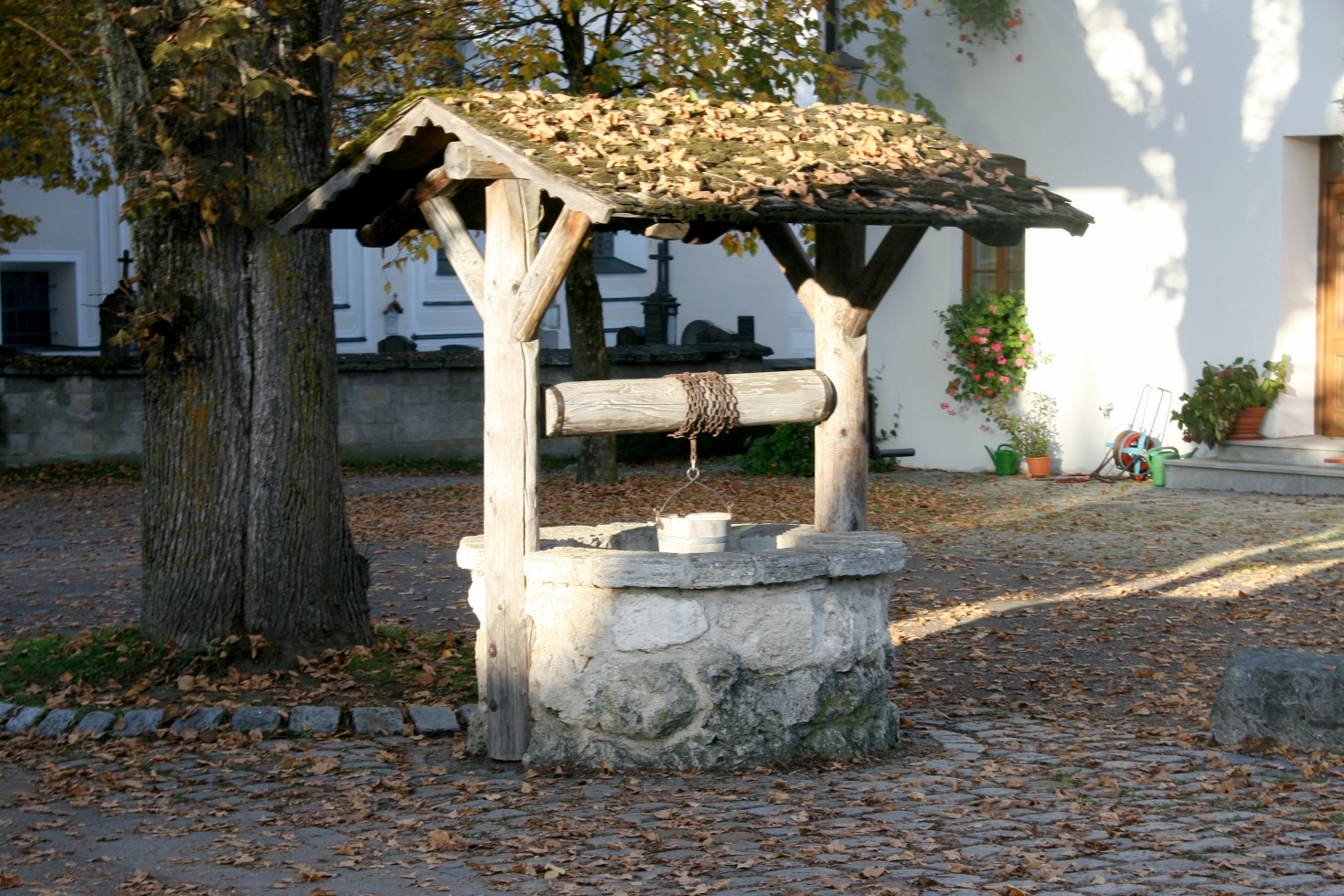 Brunnen am St.-Vitus-Platz in Iffeldorf: Brunnenschacht, 17./18. Jahrhundert, Aufbau erneuert. This is the photograph of an architectural monument. It is part of the list of cultural monuments of Bayern, no. D-1-90-132-22